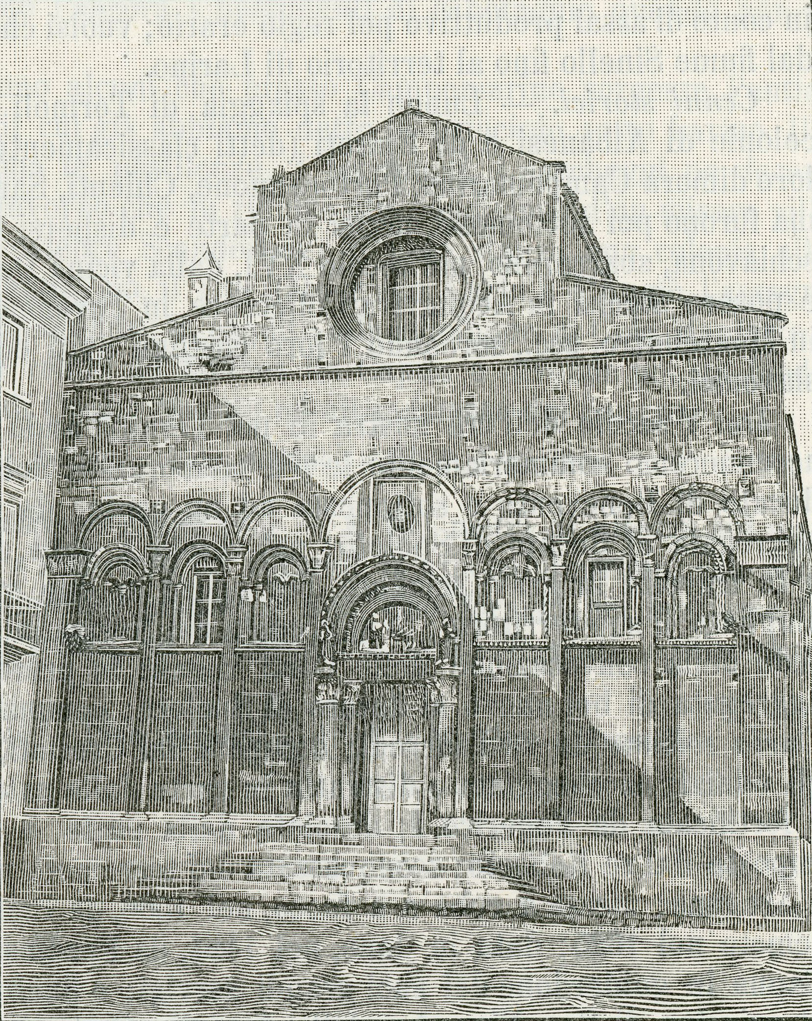 Termoli: prospetto della cattedrale (incisore anonimo 1898).